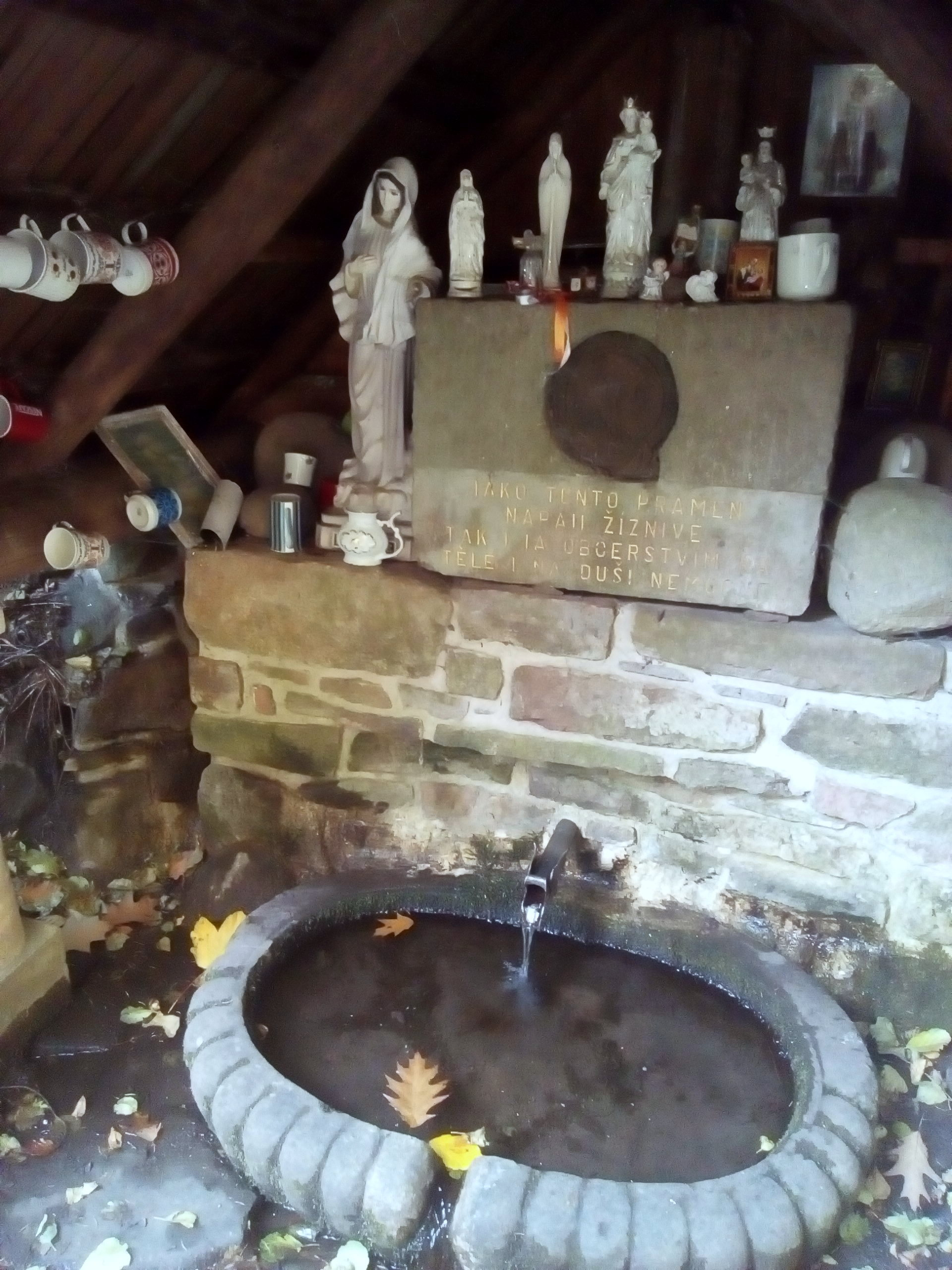 Pramen Skalákovy studánky